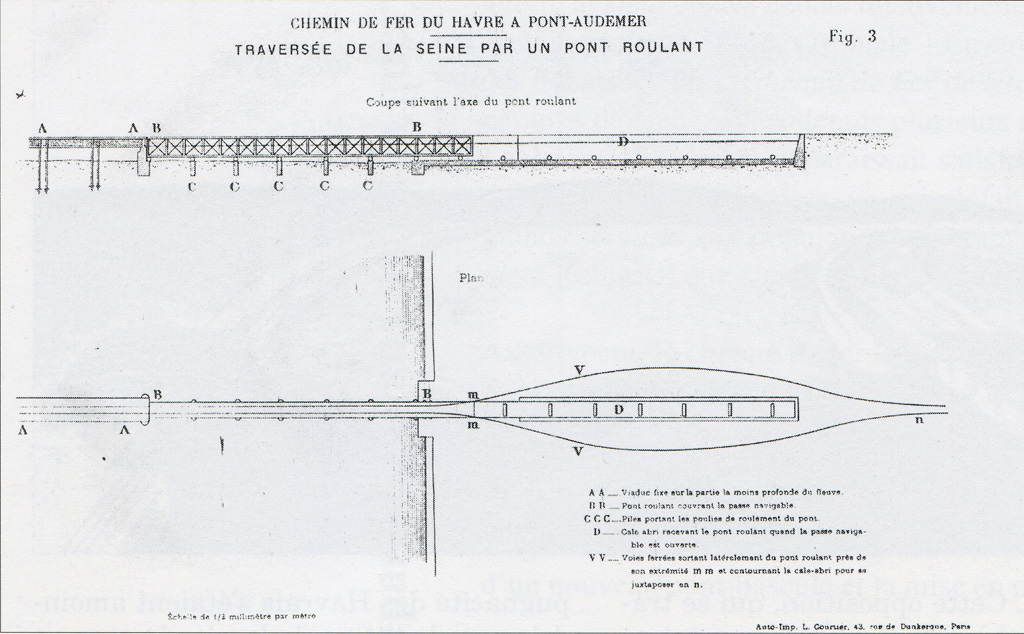 Projet Ligne du Sud-Ouest